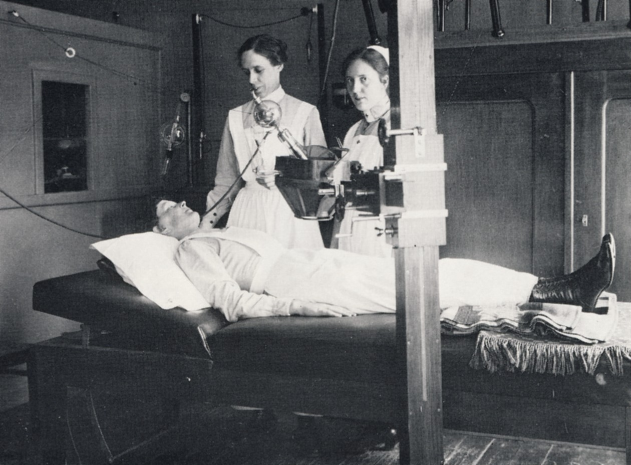 Radiumhemmet, Fjällgatan, Röntgenlaboratorium.